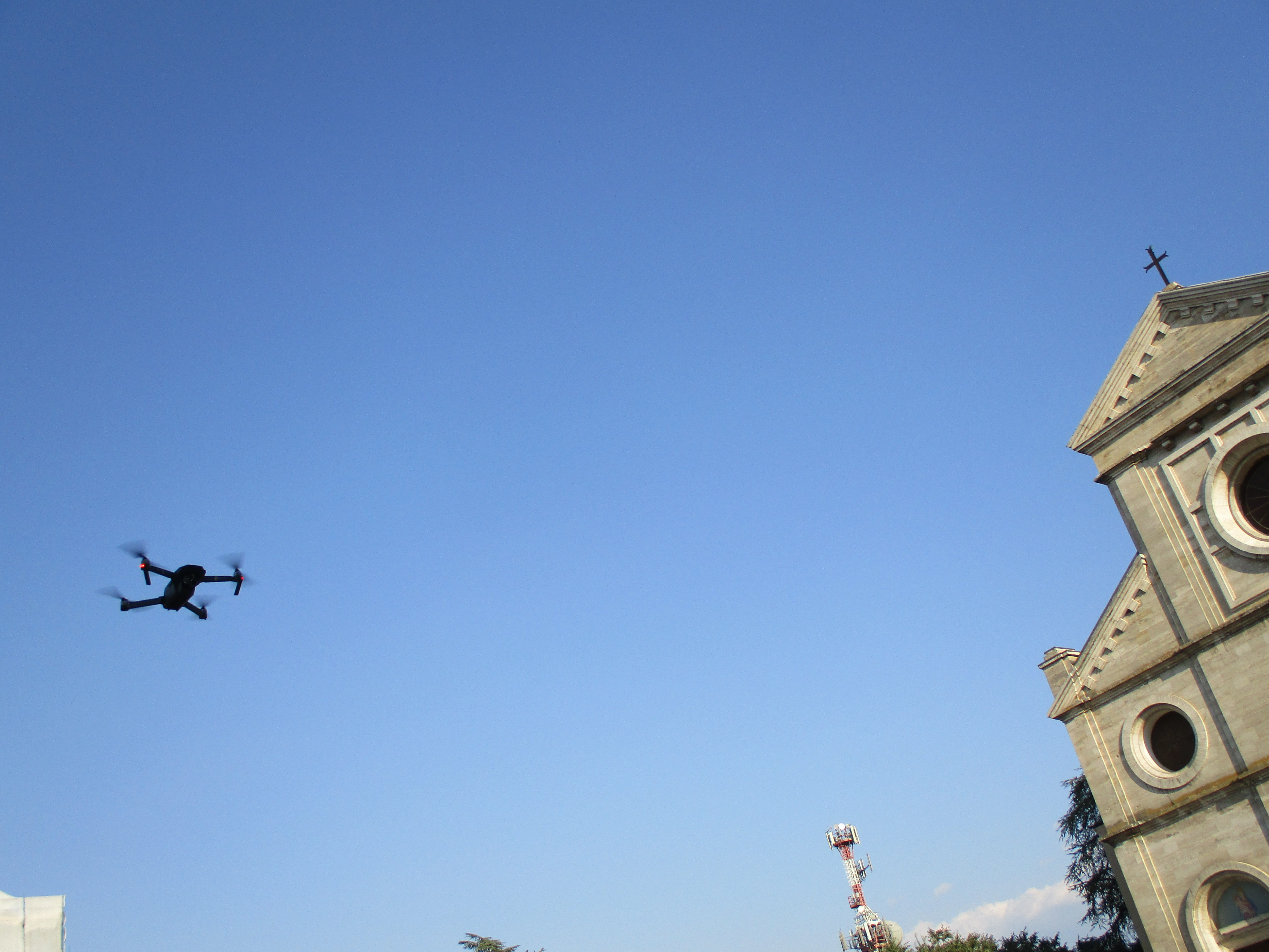 Drone in piazza Risorgimento